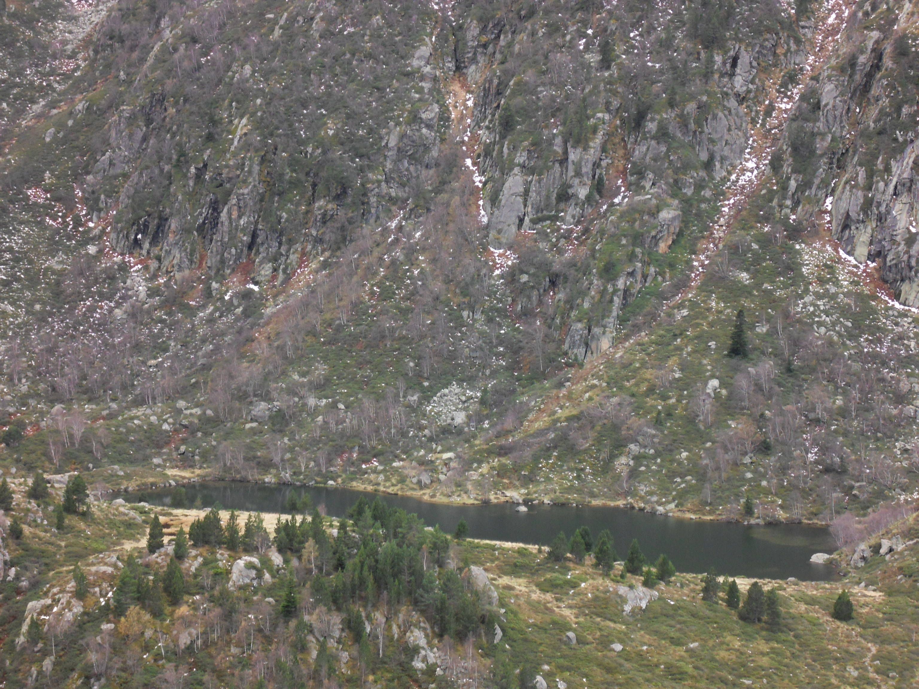 Etang de Larnoum, Ariège, Midi-Pyrénées, France